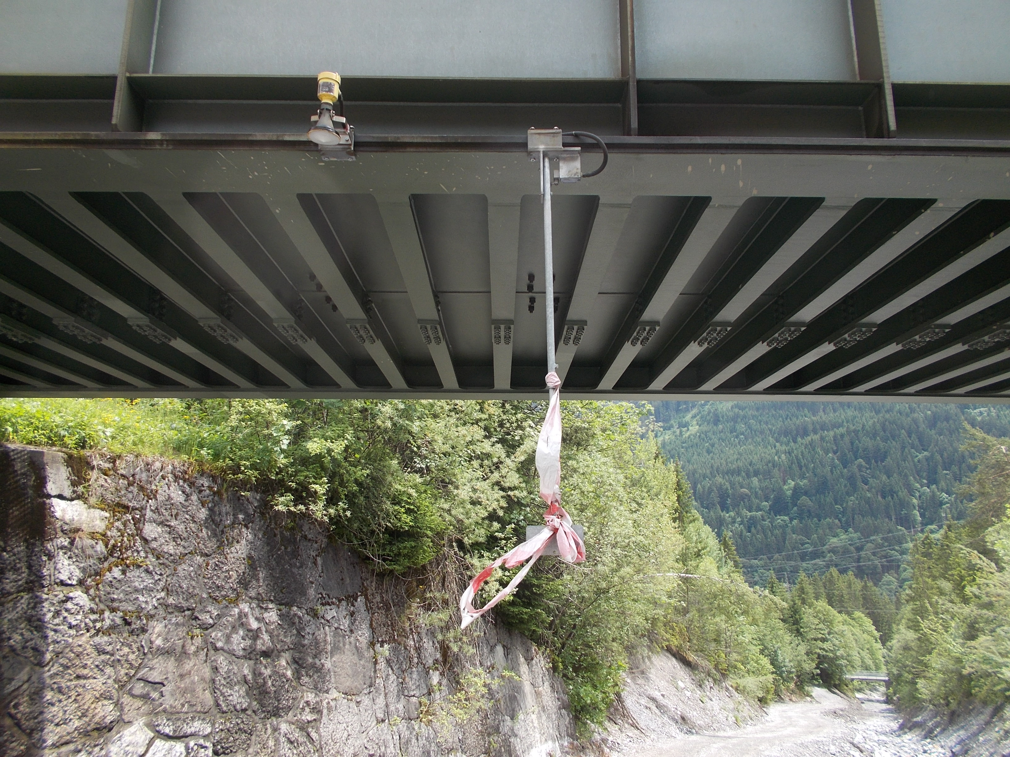 Warneinrichtung an der Glongtobelbrücke der Arlbergbahn. Wenn eine Mure oder Lawine eine für die Brücke gefährliche Höhe erreicht, wird über die (zum Schutz vor Beschädigung mit Baufahrzeugen mit Absperrband behängte) Stange ein Kontakt betätigt.